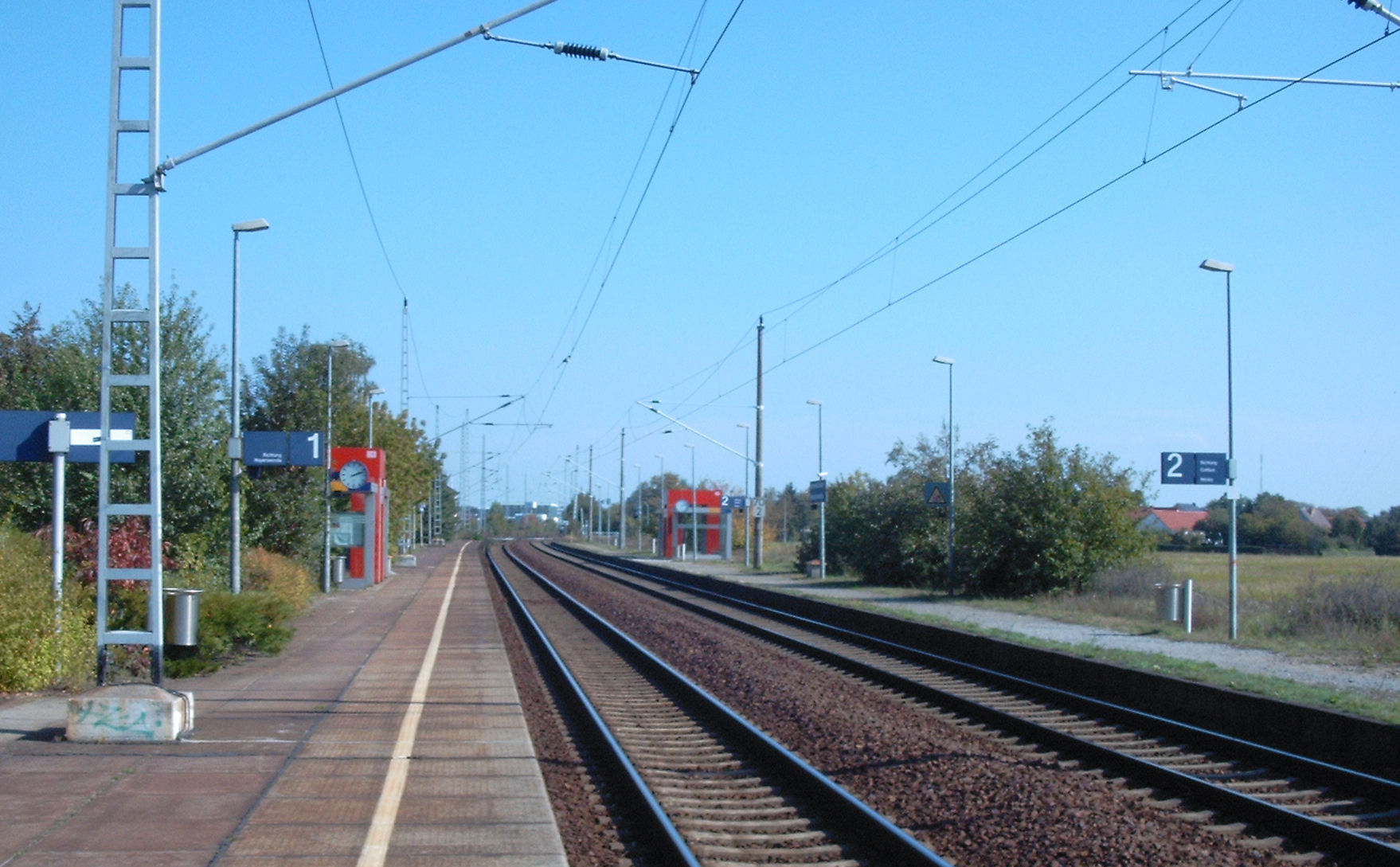 Haltepunkt Hoyerswerda Neustadt Hornjoserbsce: Wojerecy Nowe Město